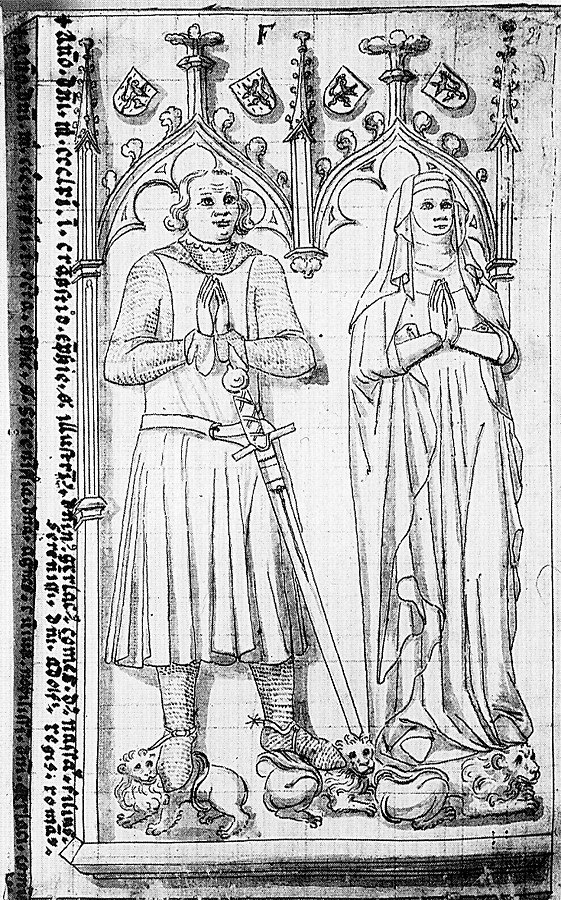 Tekening van het grafmonument voor Gerlach I van Nassau en Agnes van Hessen in klooster Klarenthal uit het Epitaphienbuch van Heinrich Dors, 1632